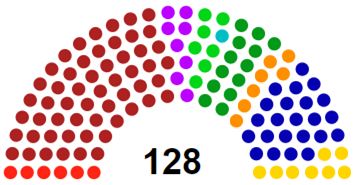 Las coaliciones estan juntas, por lo que es visiblemente la composición del Senado por Coalición.